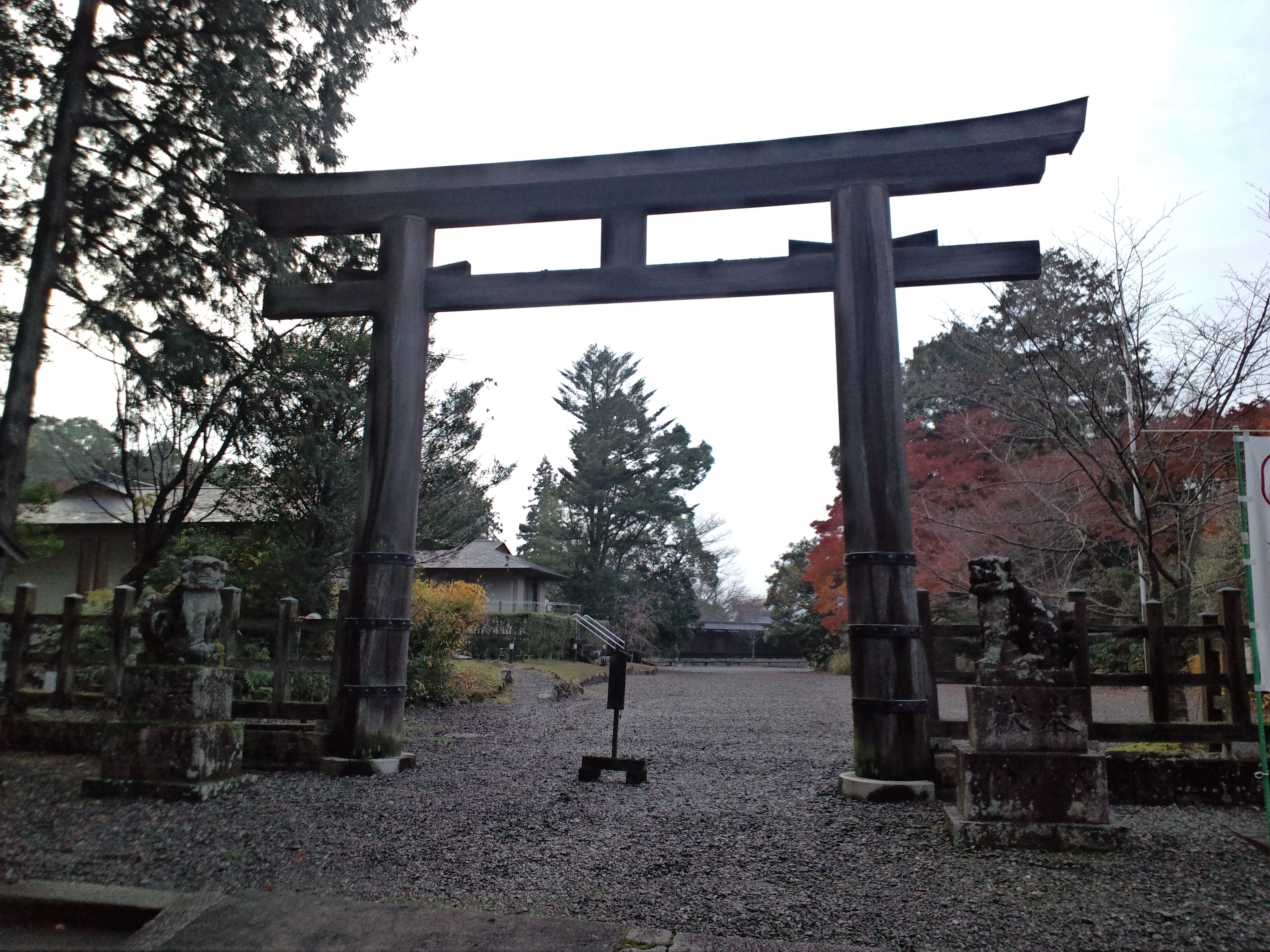 吉野神宮 鳥居